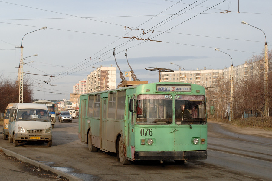 ZiU-9 076 in Miass